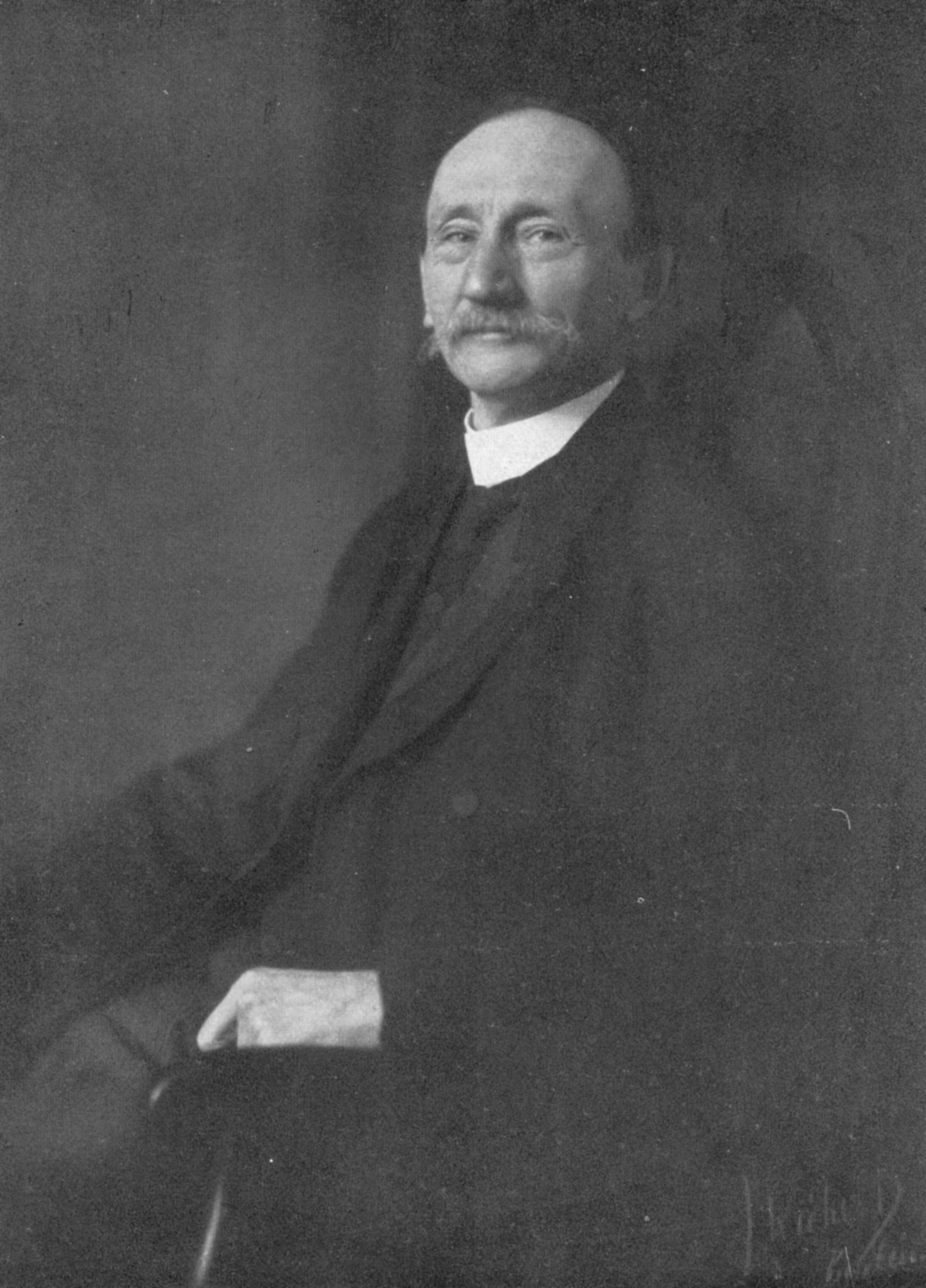 Dr.-Ing. h. c. Karl Wichert, Ministerial- und Oberbaudirektor im Ministerium der öffentlichen Arbeiten